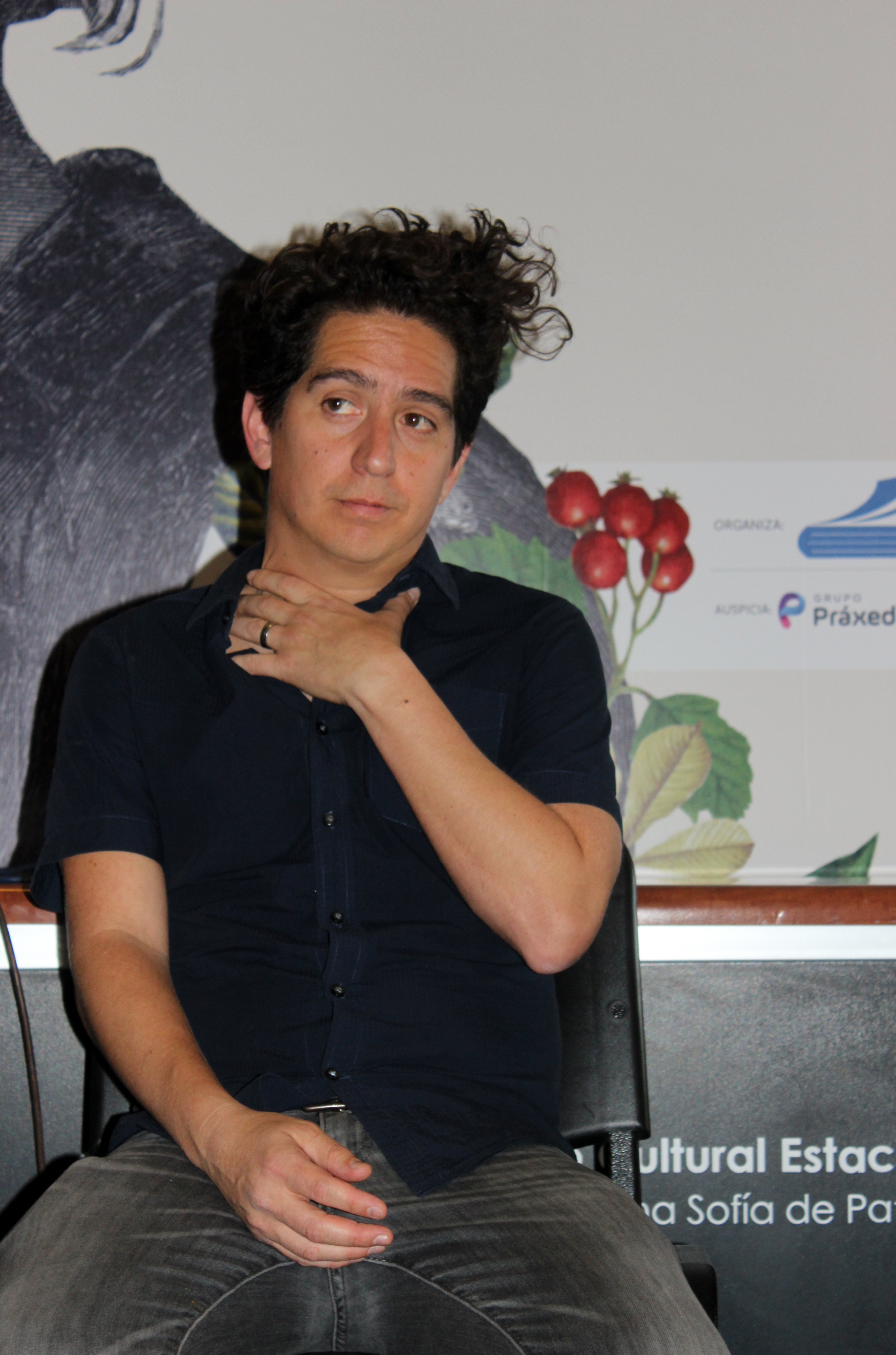 El escritor peruano-estaodunidense Daniel Alarcón en la Feria Internacional del Libro de Santiago 2018.